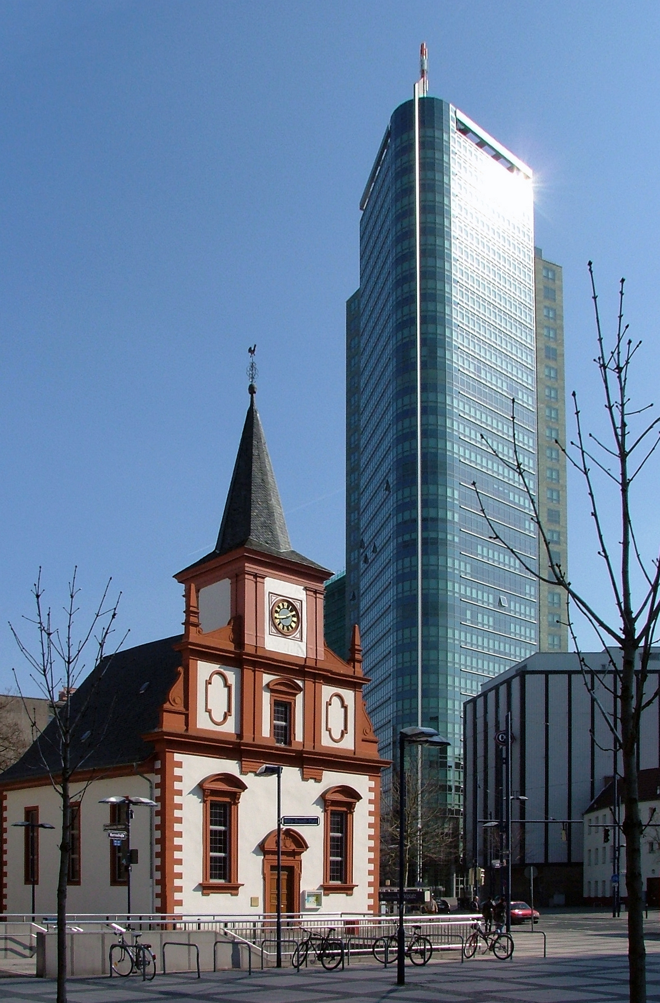 Französisch reformierte Kirche und City Tower, Offenbach am Main